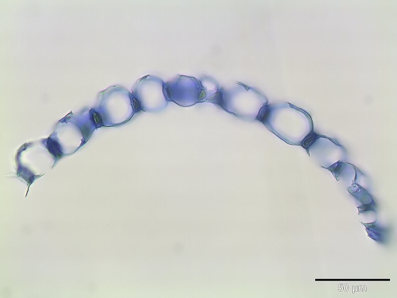 Sphagnum fimbriatum, Astblatt Querschnitt, 400x